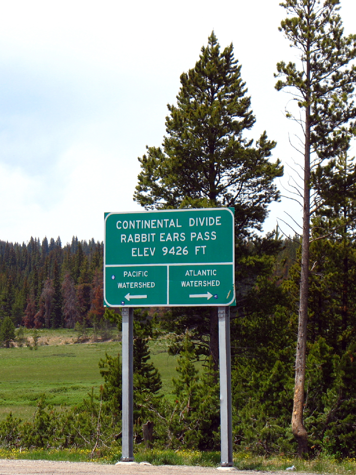 Rabbit ears pass, un col sur le continental divide, entre Steamboat Springs et Granby dans le Colorado